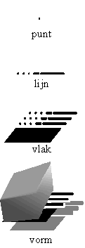 Deze afbeelding is een weergave van de opeenvolgende dimensies en op welke manier ze de vorige aanvullen. De afbeelding heb ik zelf gemaakt voor een scriptie over dimensies en toestanden. Hierbij geef ik Wikipedia uitdrukkelijk toestemming deze afbeelding te gebruiken.